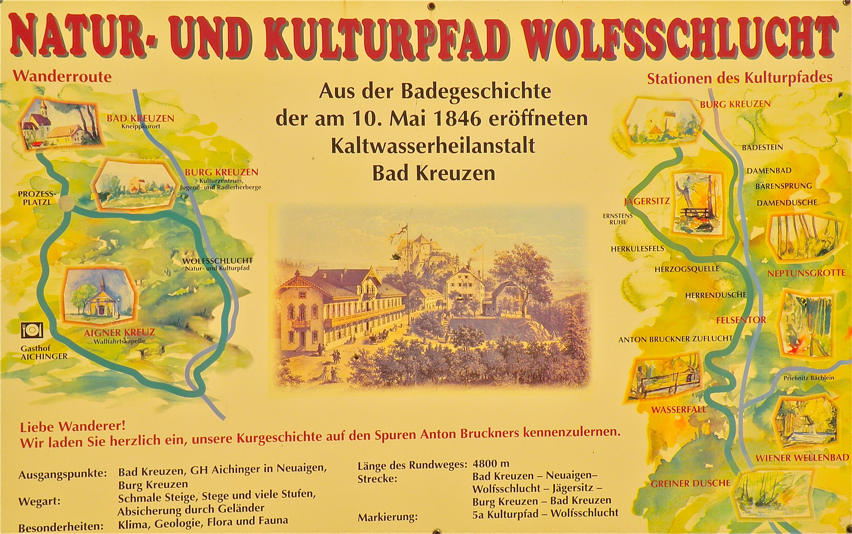 Übersichtskarte am Eingang der Wolfsschlucht beim Aigner-Kreuz in Bad Kreuzen im Bezirk Perg in Oberösterreich